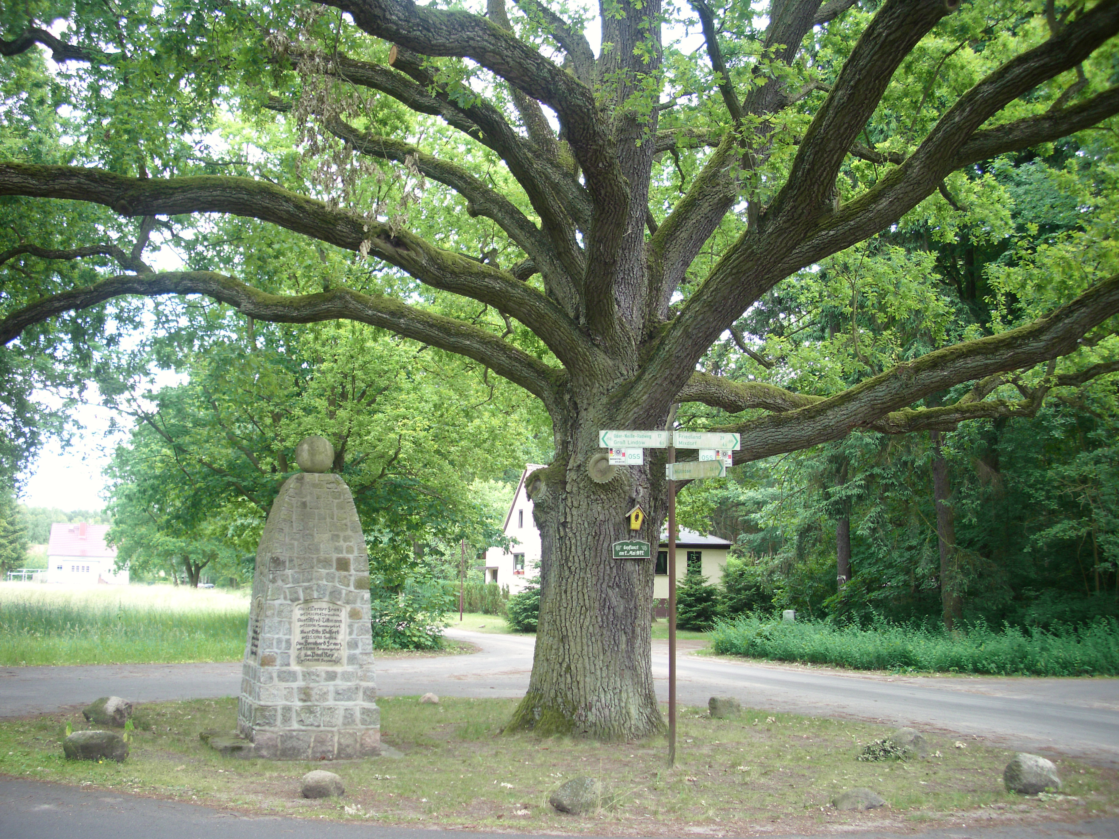 Denkmal und Eiche (gepflanzt 2. Mai 1872, Naturdenkmal) in Müllrose-Kaisermühl, Landkreis Oder-Spree, Brandenburg